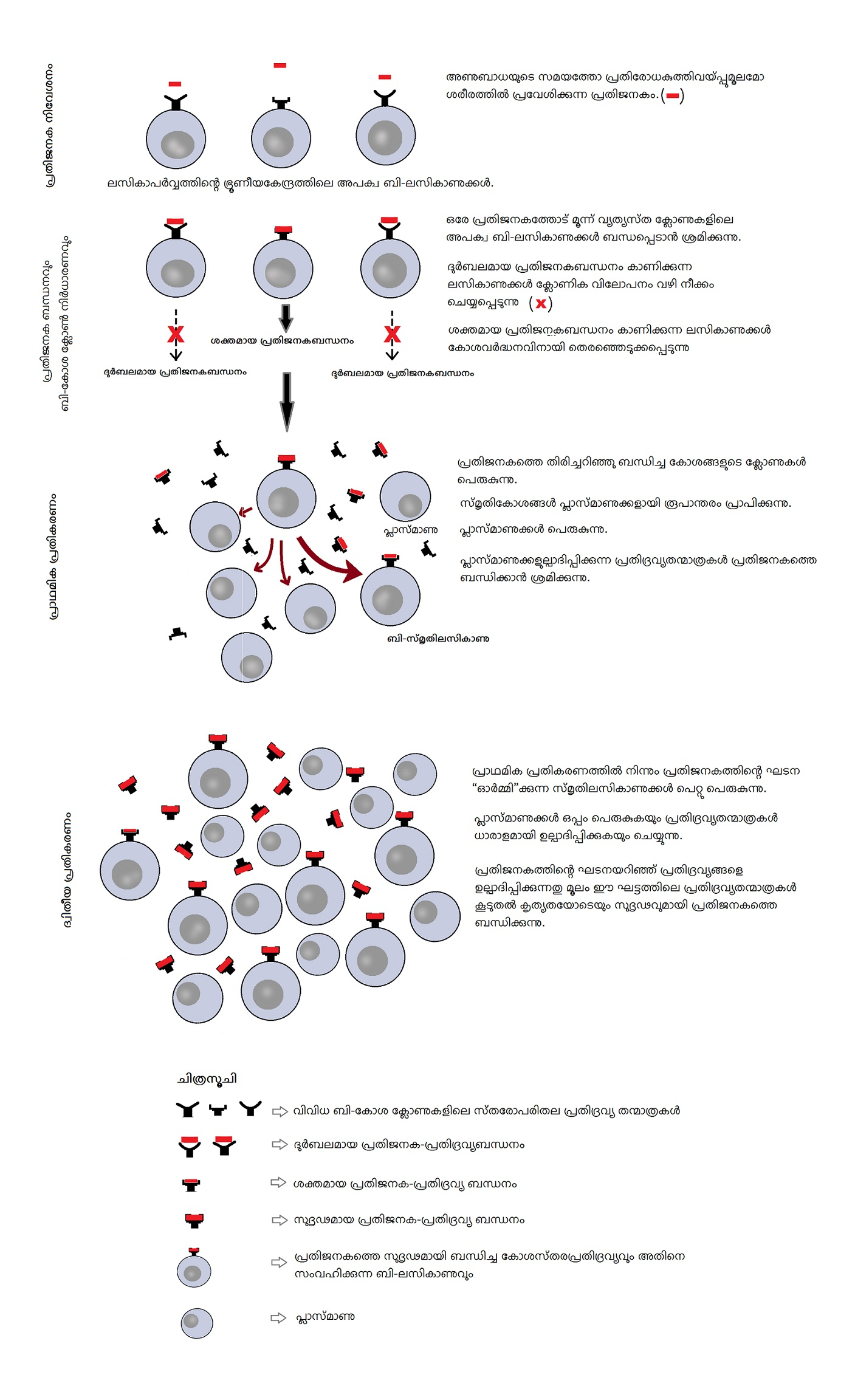 ബി-ലസികാണുക്കളുടെ പ്രതിജനകബന്ധനം,ക്ലോണിക നിർധാരണം,ക്ലോണിക വിലോപനം,പ്രതിജനക-പ്രതിദ്രവ്യബന്ധനം എന്നിവയുടെ സംക്ഷിപ്ത വിവരണചിത്രം.